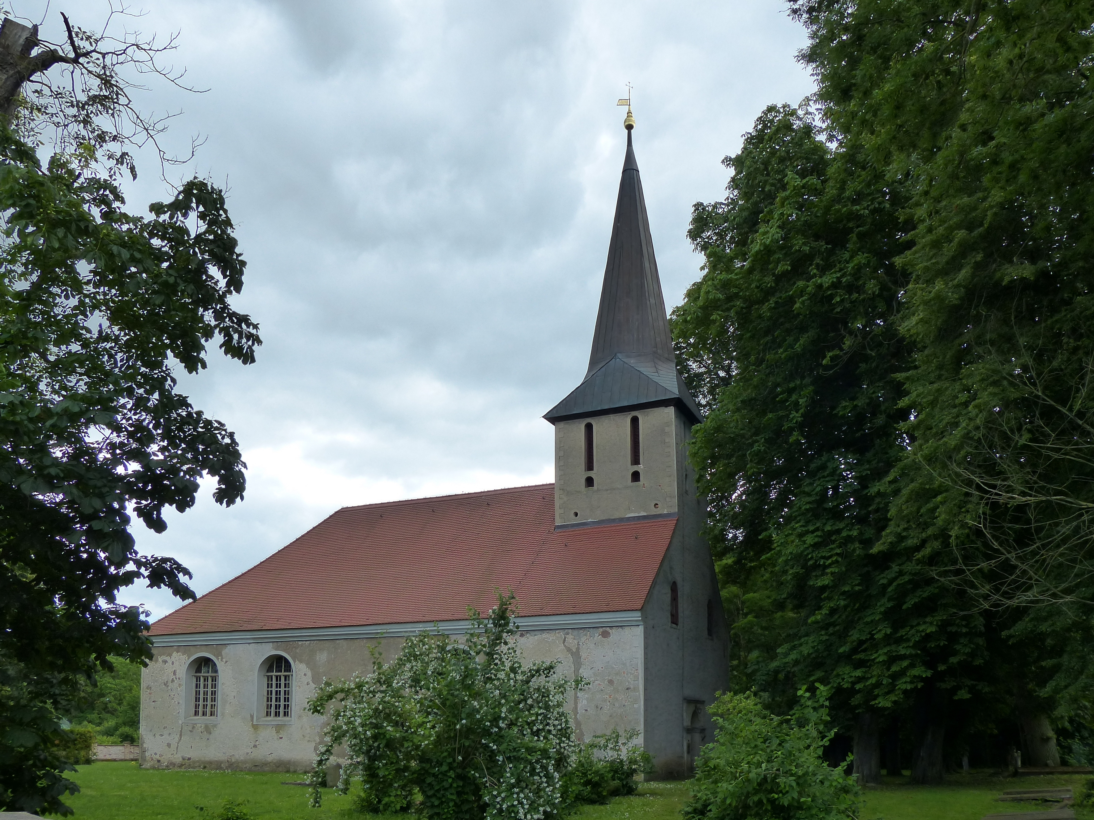 Kirche Putzar, Ansicht vom nördlichen Friedhofseingang